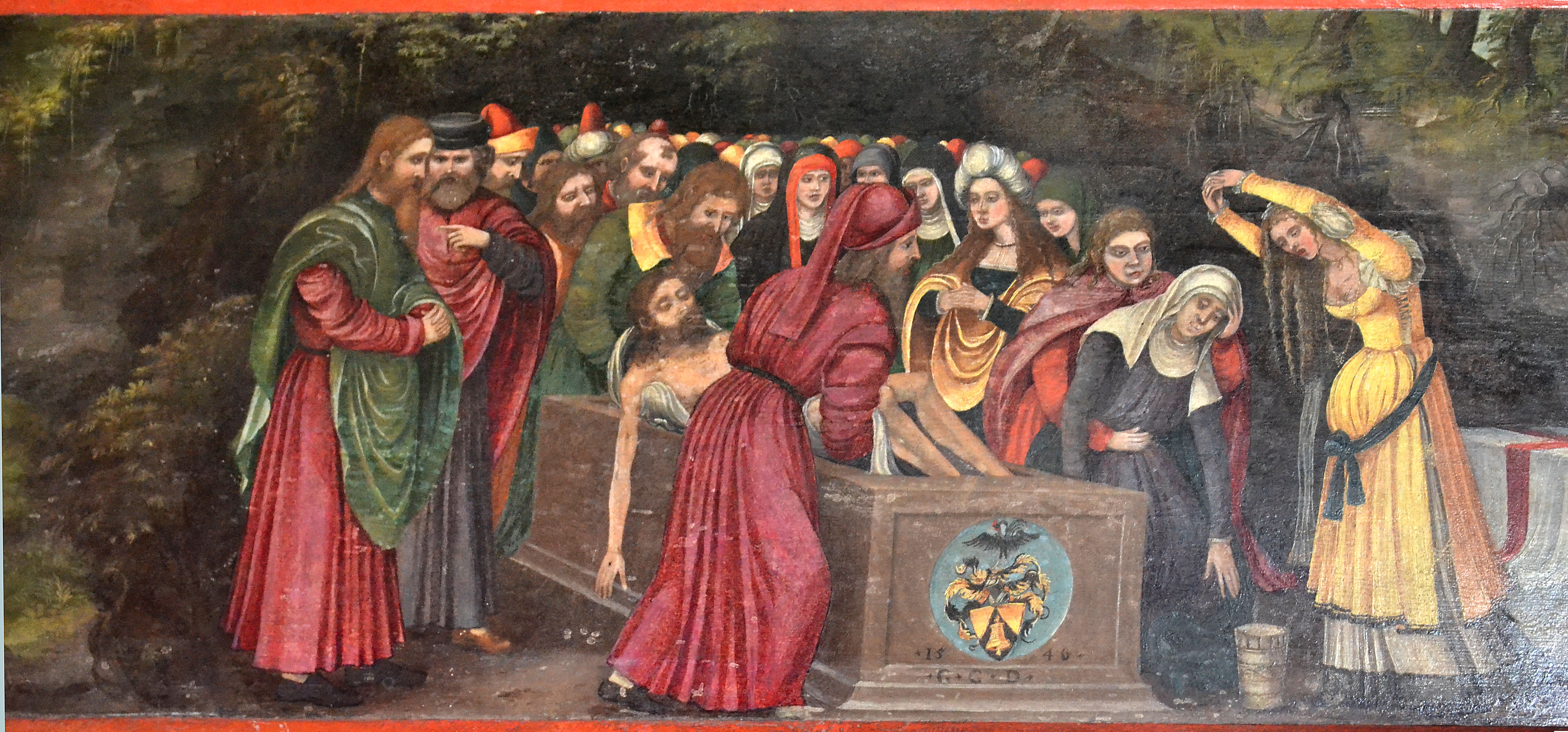 Marianowo - zespół klasztorny cystersów